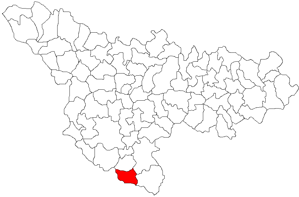 Categorie:Hărţi ale judeţului Timiş